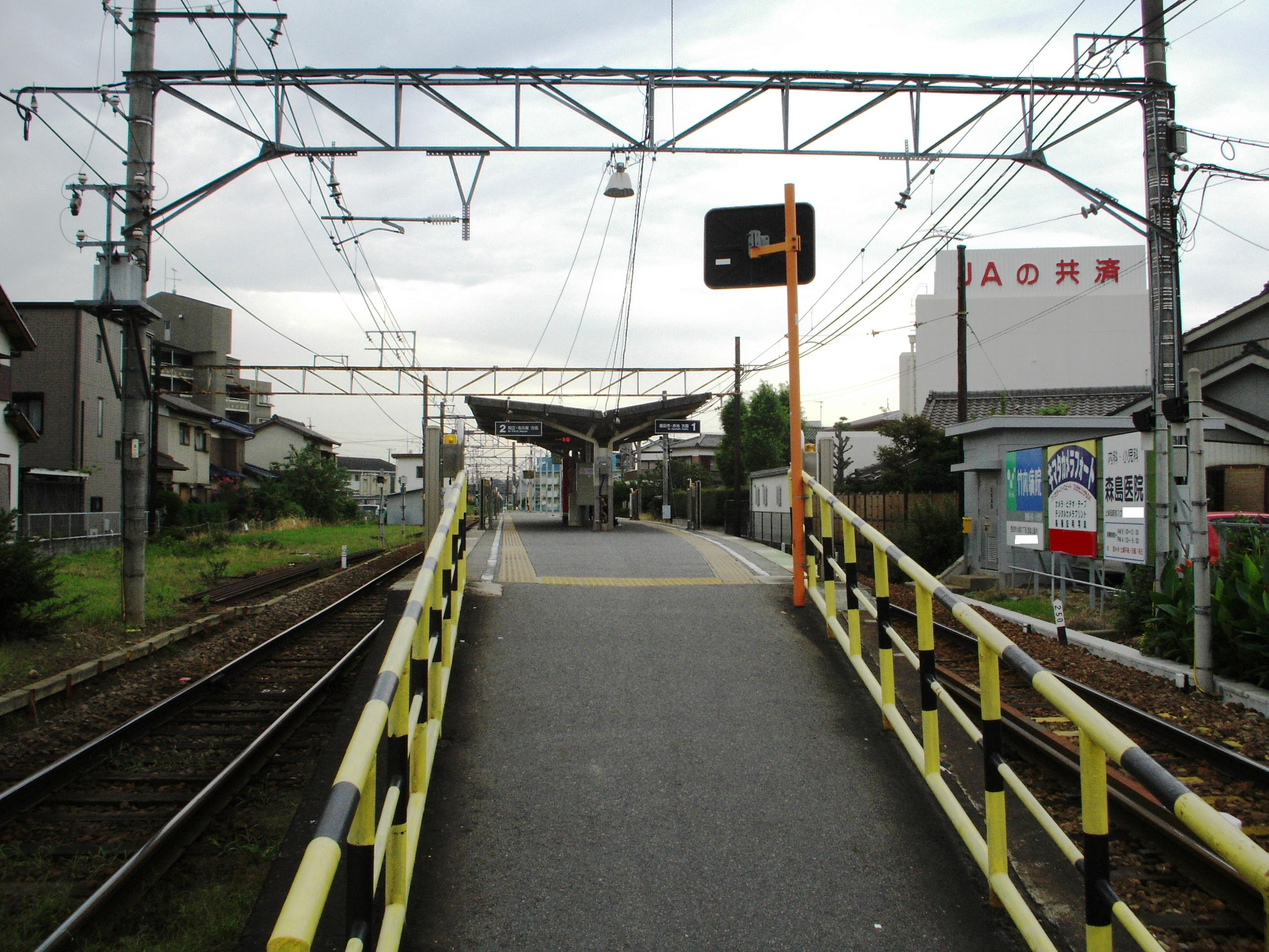 上挙母駅プラットホーム